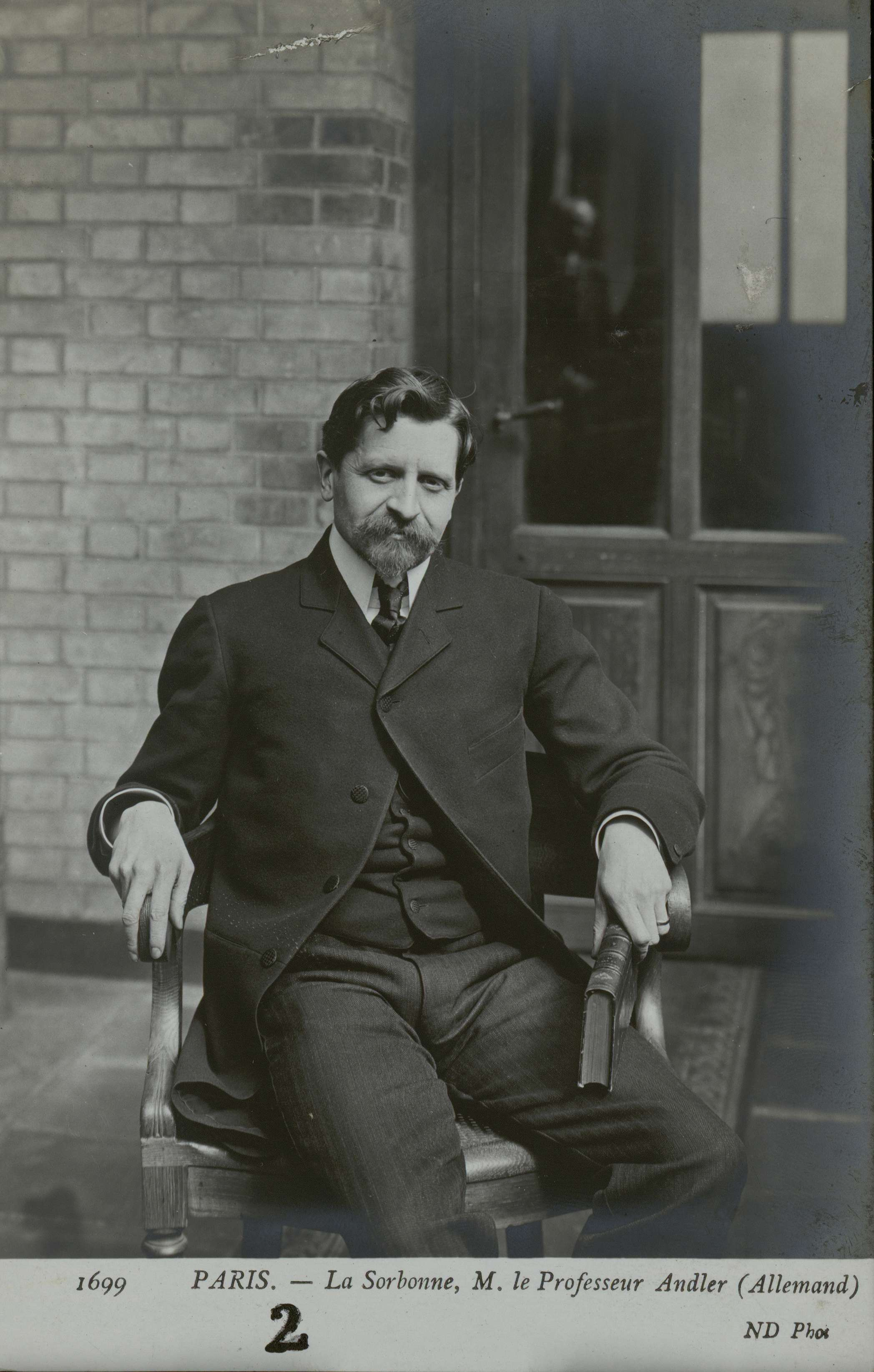 Carte postale photographique